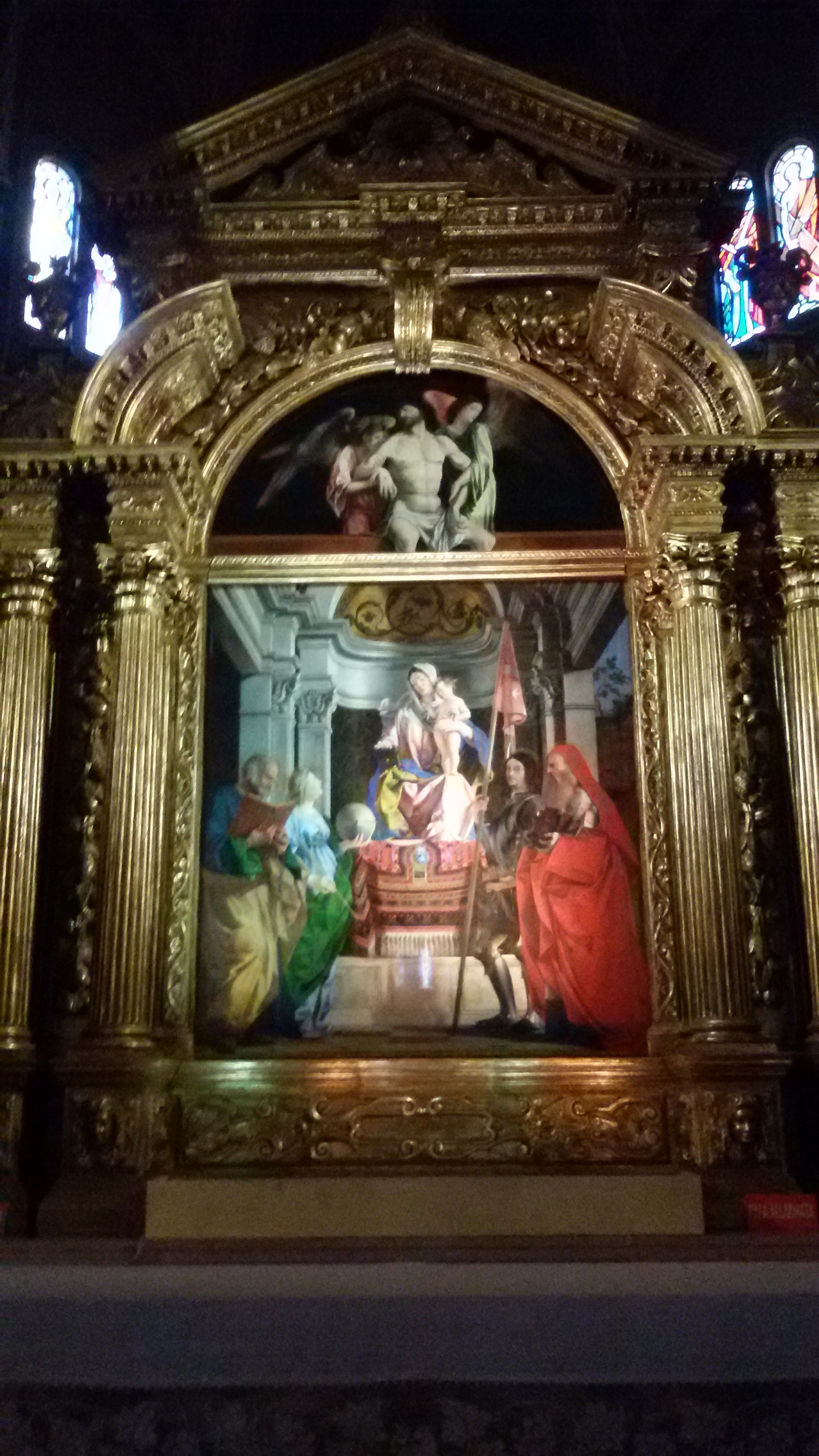 Chiesa di Santa Cristina Quinto di Treviso